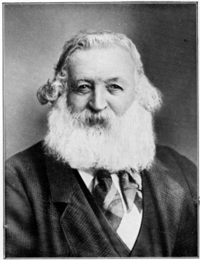 Der Zürcher Arbeiterführer und Frühsozialist Karl Bürkli. Erster "autochtoner Sozialist der Schweiz"